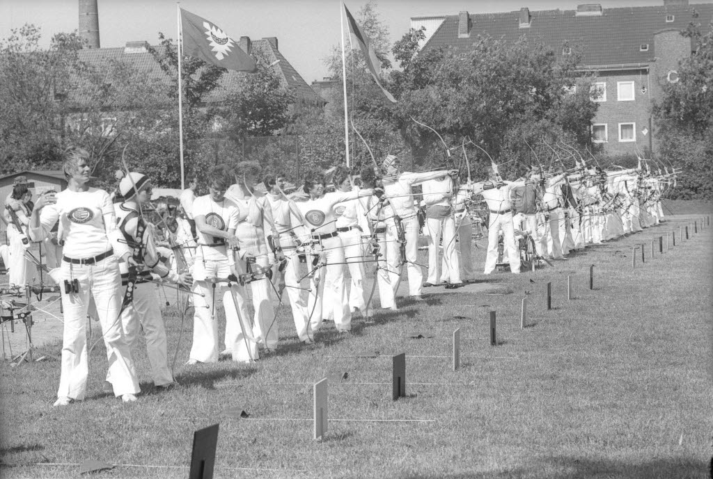 auf dem Sportplatz der Goetheschule am Westring. Ausrichter ist der 1. Kieler Bogenclub von 1976 e.V.